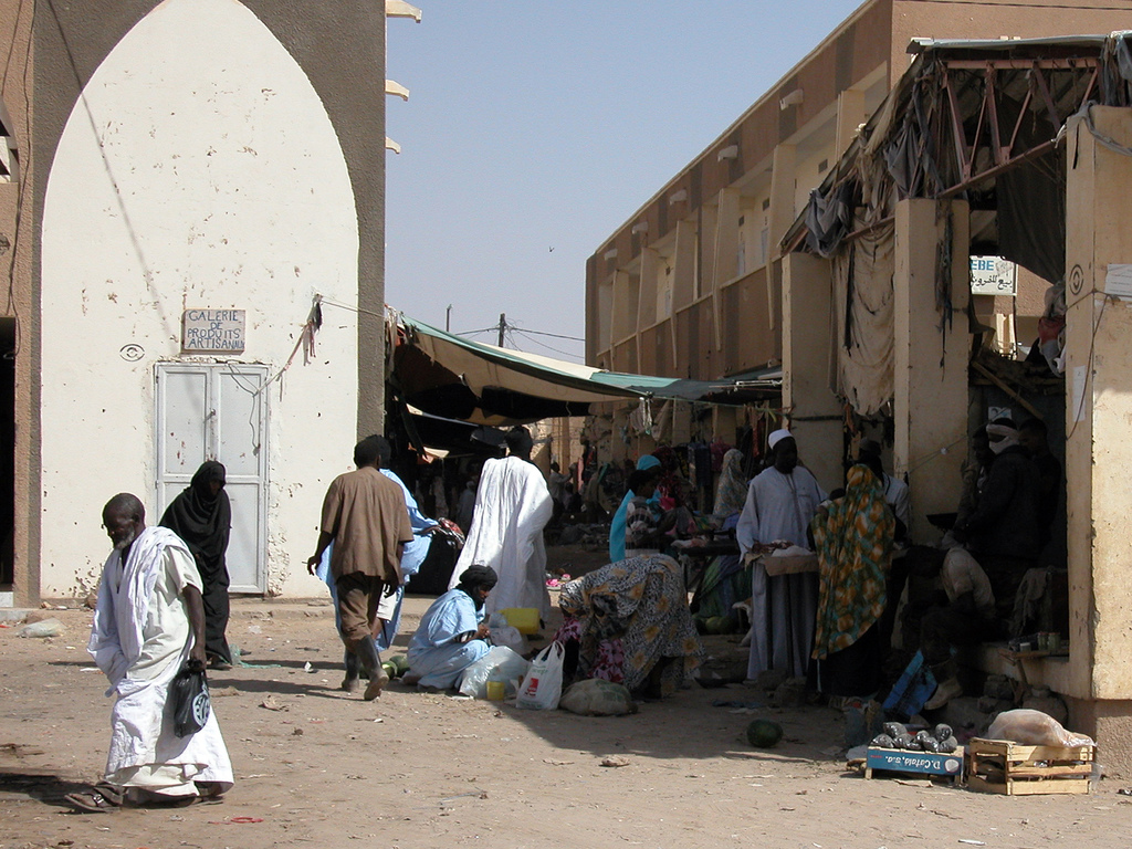 Atar, Mauritania